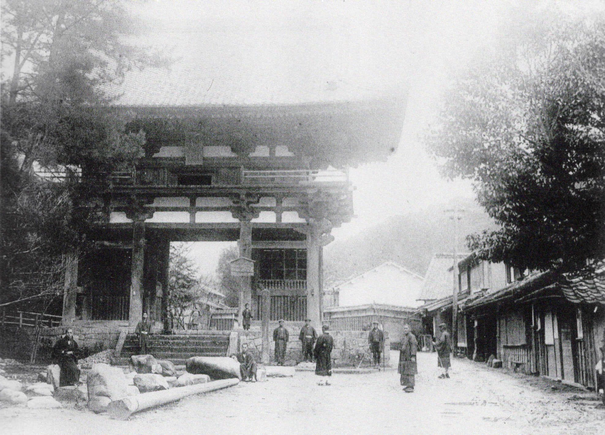 滝山寺三門。大正時代。